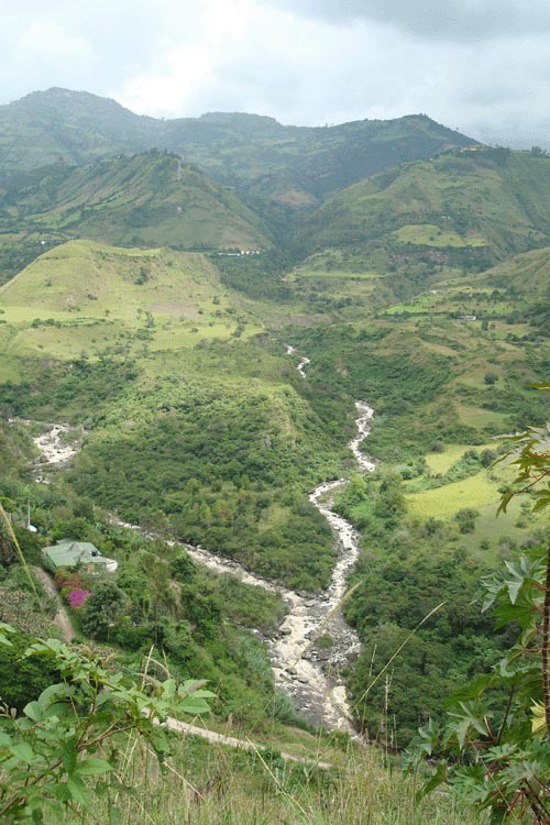 Punto de encuentro entre los ríos Bobo y Curiaco, estableciendo el límite entre Tangua, Yacuanquer y Funes